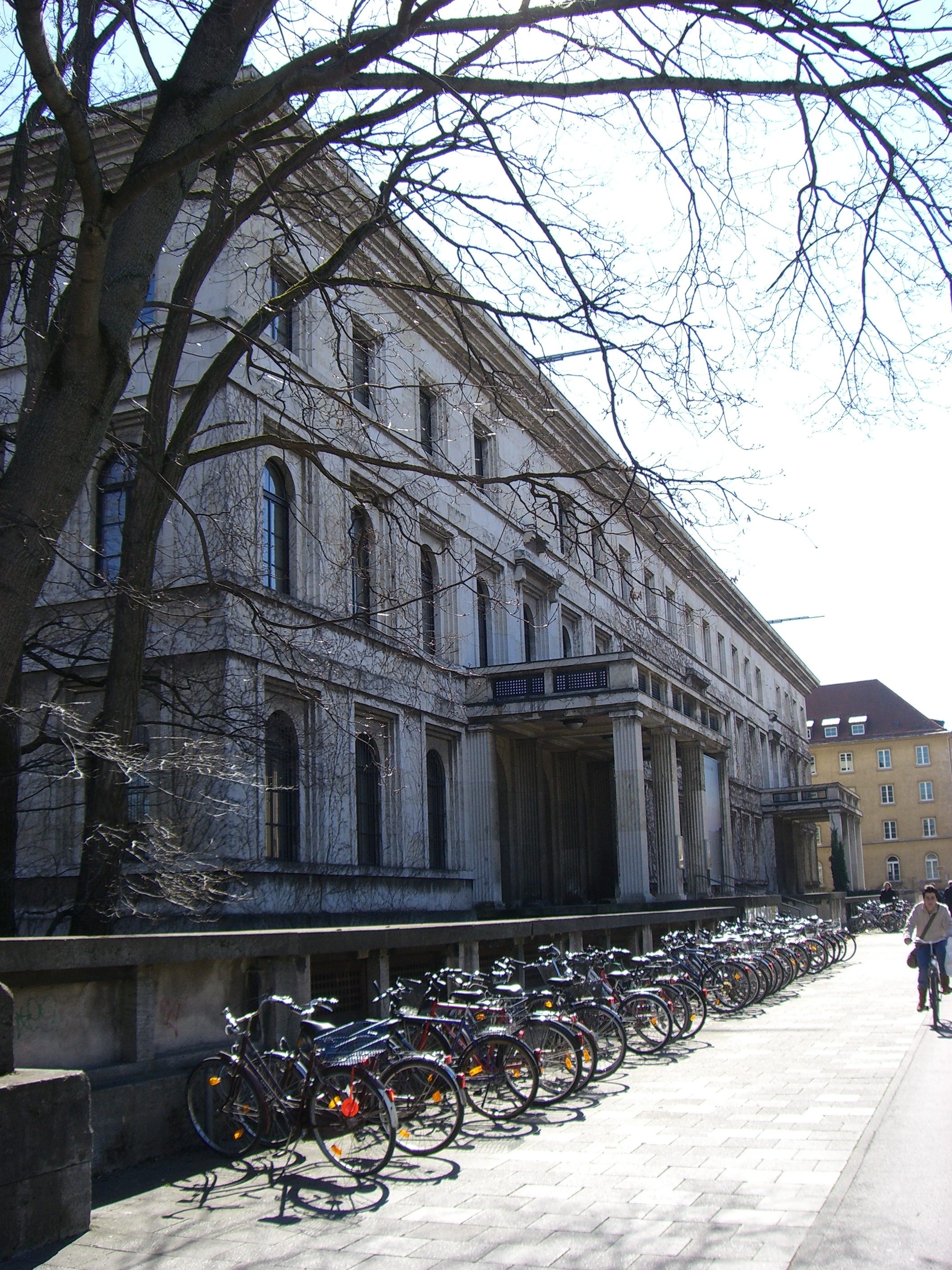 Museum für Abgüsse klassischer Bildwerke (Gebäudefassade)